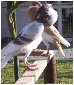 Brünner Kröpfer in den Farben rotfahl-geherzt (im Vordergrund) und in gelb-geherzt (hinten).